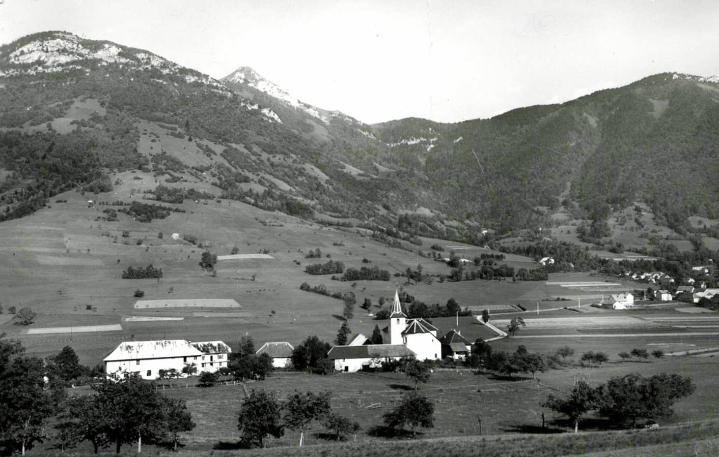 Carte postale ancienne (1950) du chef-lieu de Puygros.